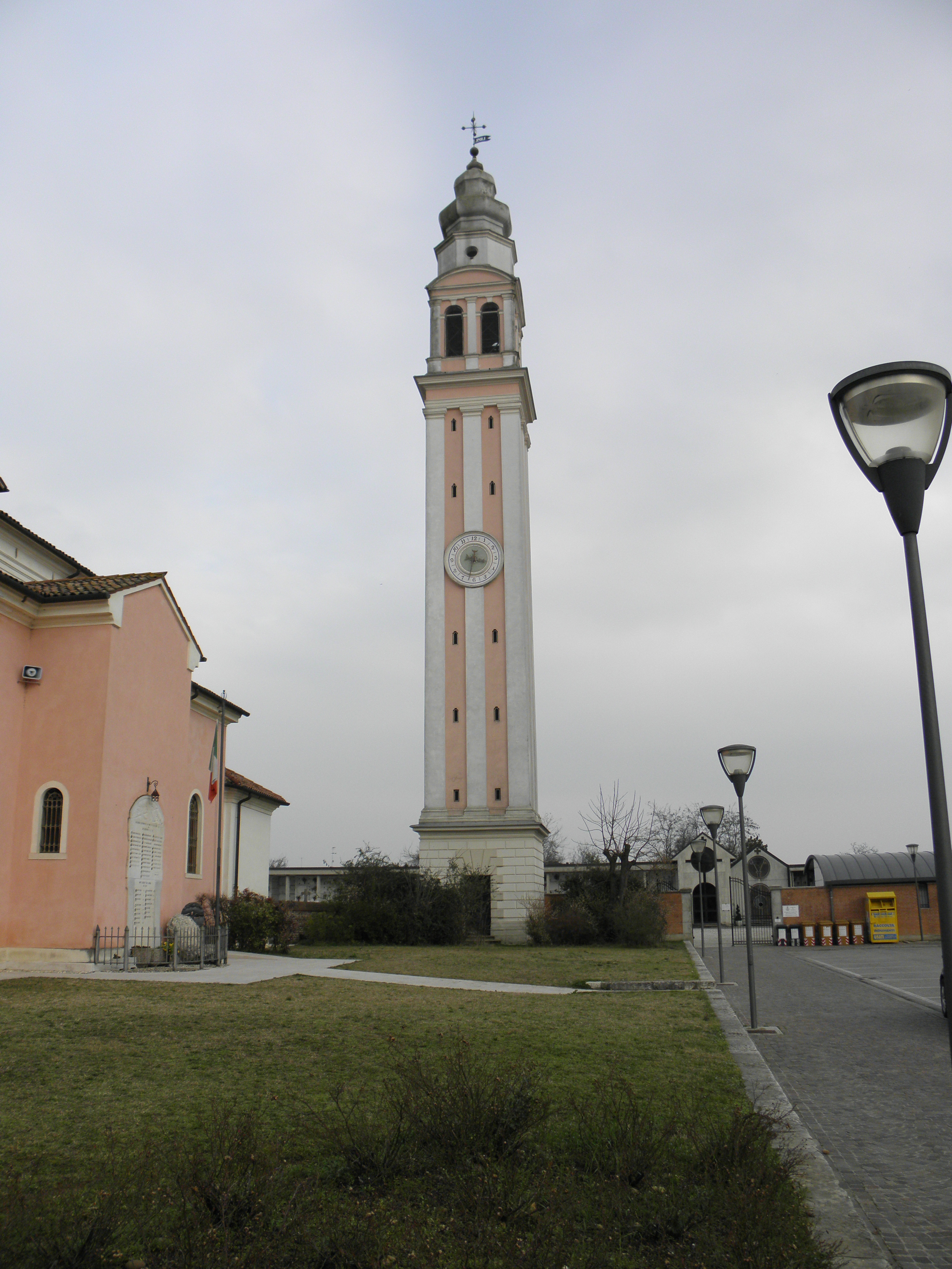 Ospedaletto, frazione di Istrana: il campanile della chiesa parrocchiale della Purificazione della Beata Vergine Maria.